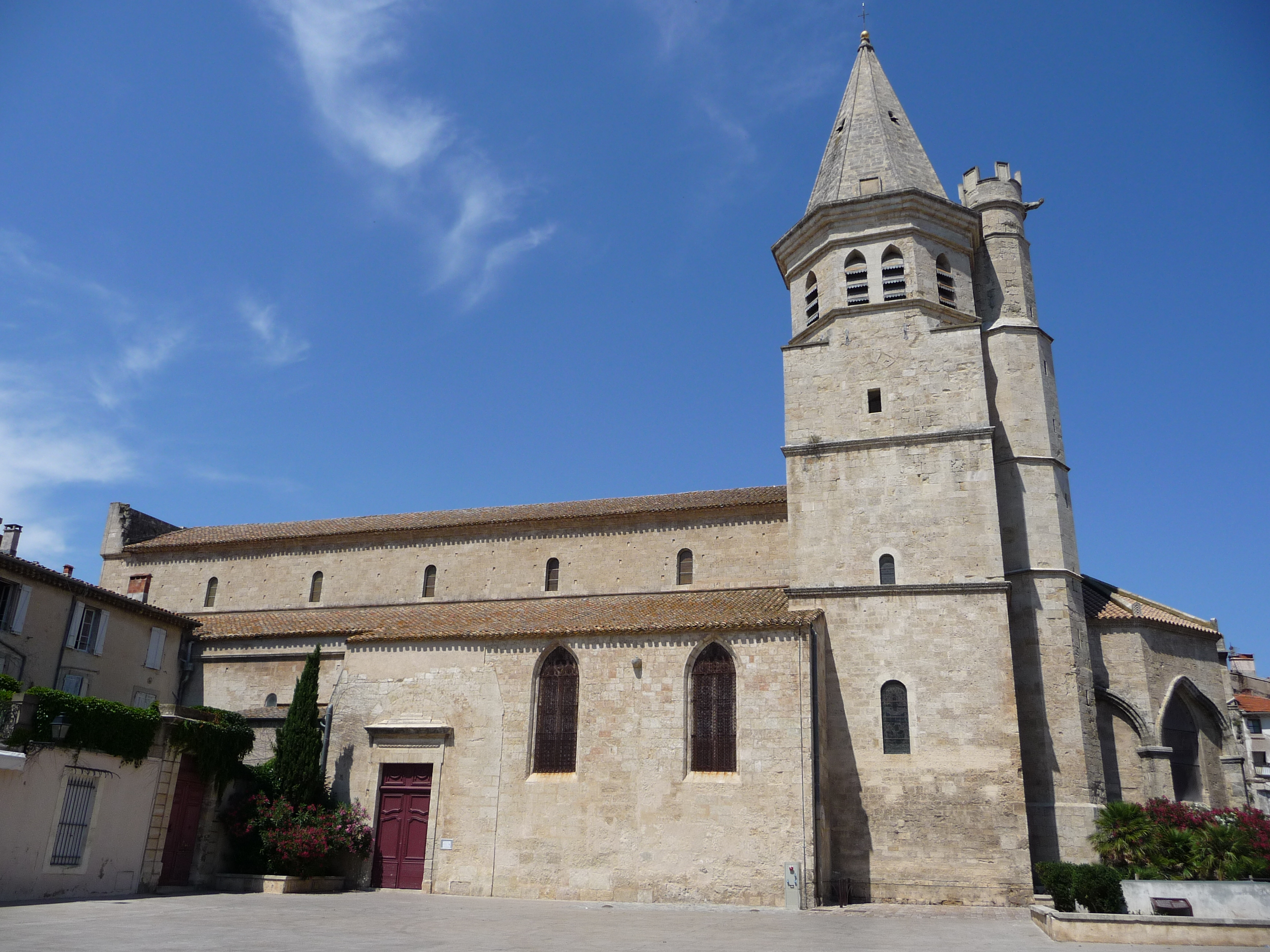 Vista general de l'església de la Magdalena (Besiers)